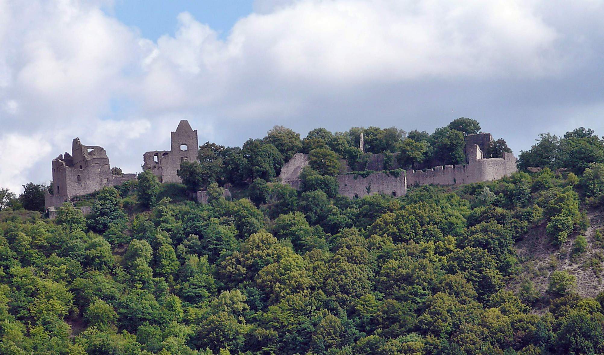 Burgruine Homburg (bei Gössenheim), Gesamtansicht von Westen